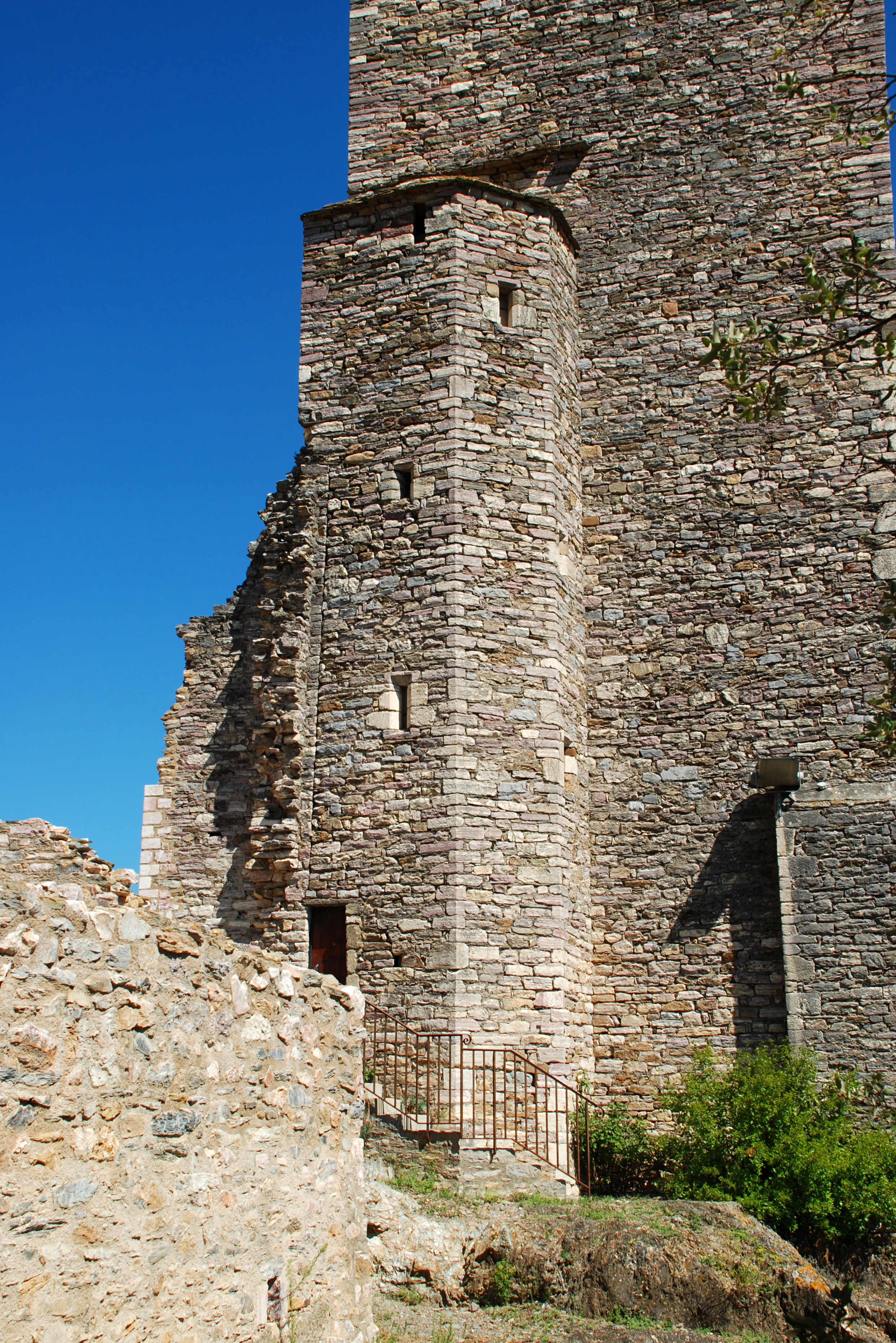 France - Languedoc - Hérault - Olargues - Église Saint-Laurent .